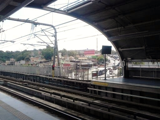 Plataforma da Estação Capão Redondo